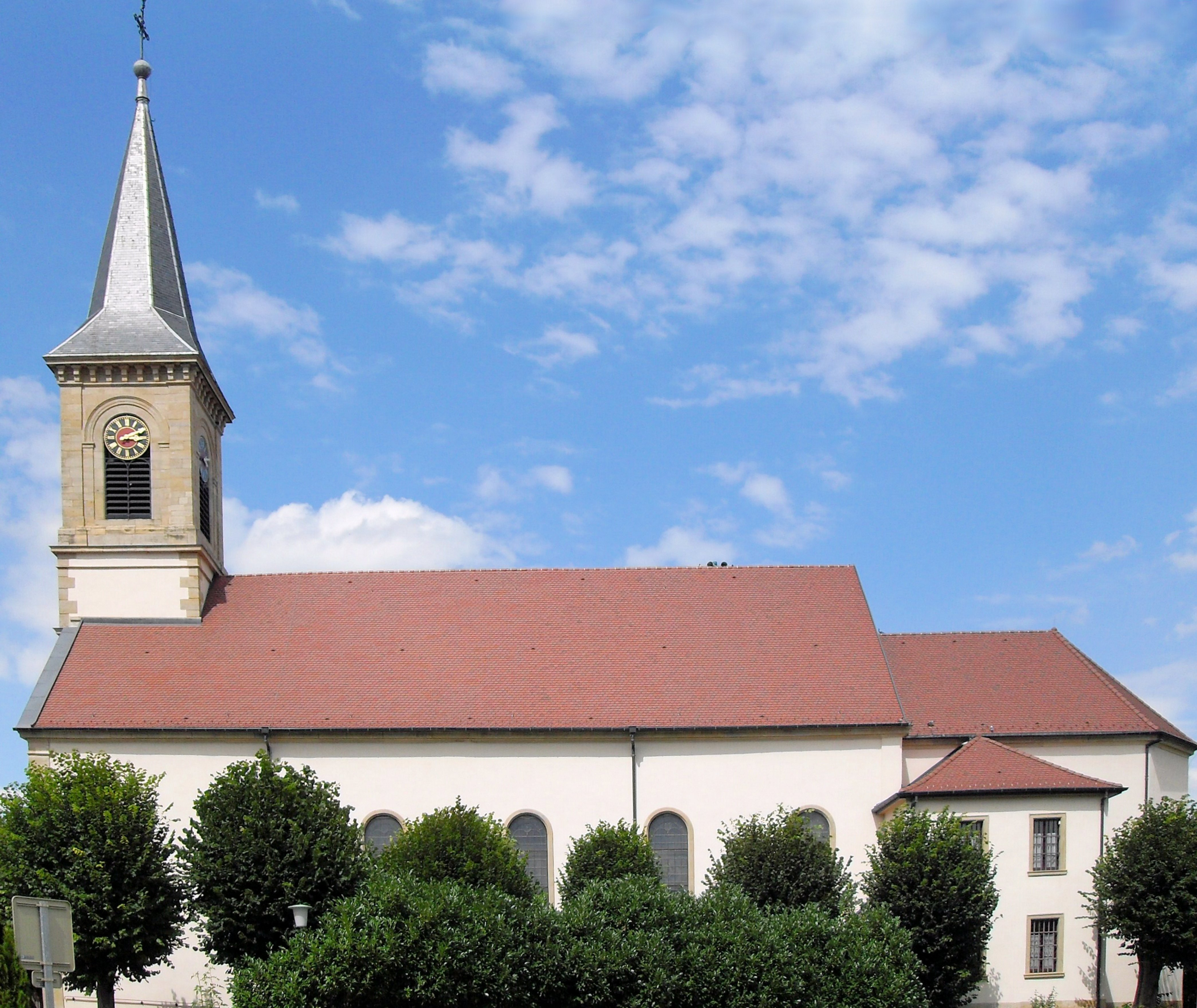 L'église Saint-Pierre, Saint-Paul à Heimersdorf